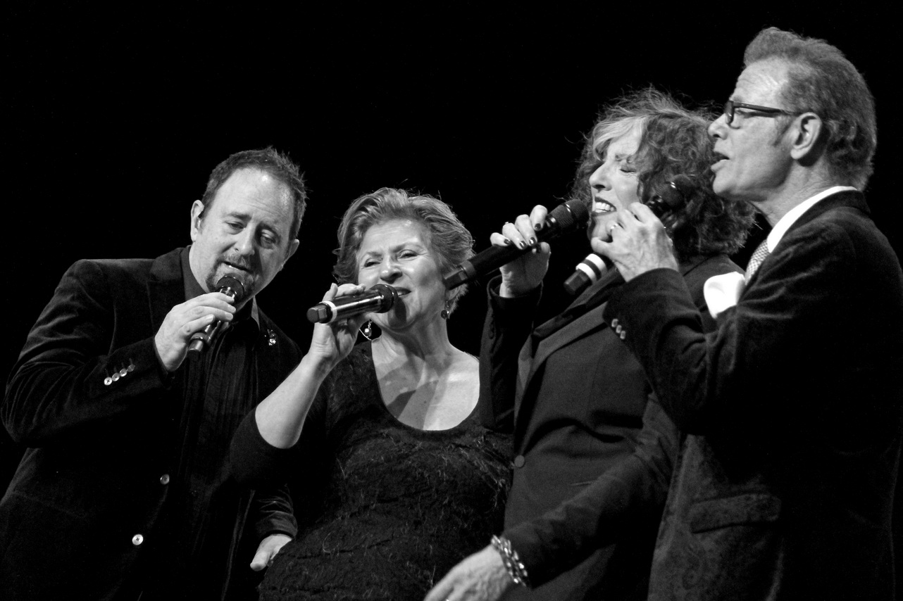 The Manhattan Transfer, St. Ingberter Jazzfestival 2017